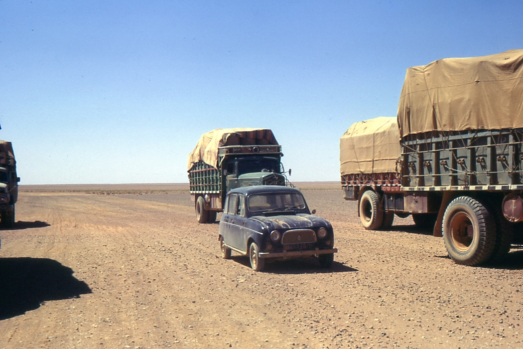 Renault 4 et camions irakiens sur la piste Damas-Bagdad en 1970